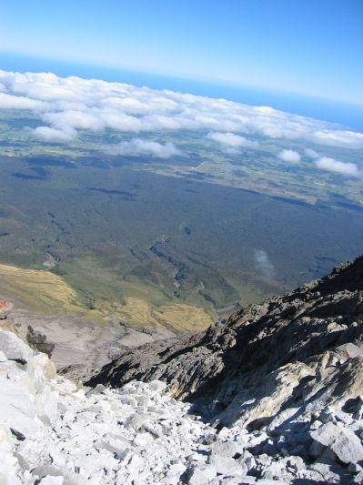 Egmont-Nationalpark vom Gipfel des Mount Taranaki aus gesehen. Deutlich ist der den Berg umgebende Regenwald (dunkelgrün) zu erkennen. Dahinter befindet sich die Grenze des Nationalparks mit gerodetem Farmland. Hinter den Wolken erkennt man die Tasmansee.